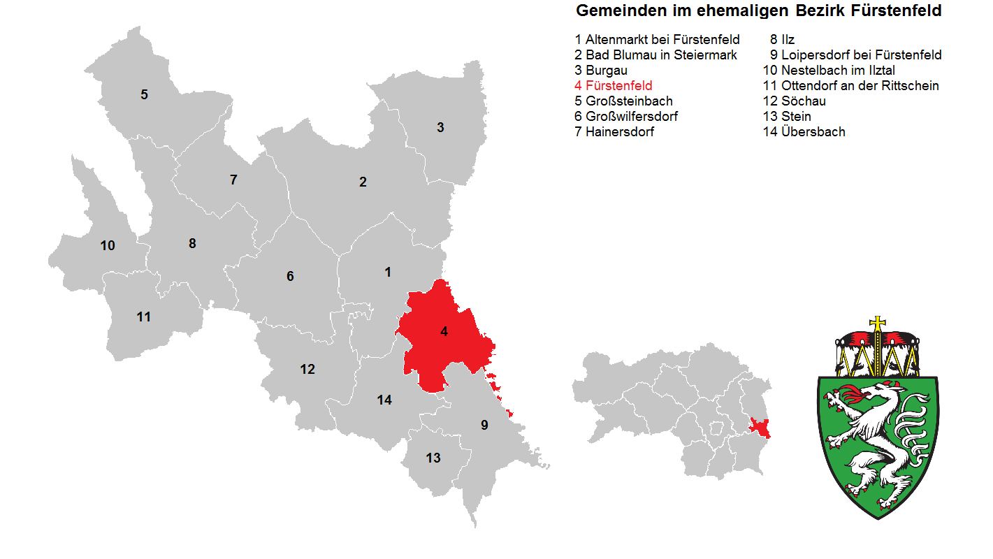 Bezirk FÃ¼rstenfeld